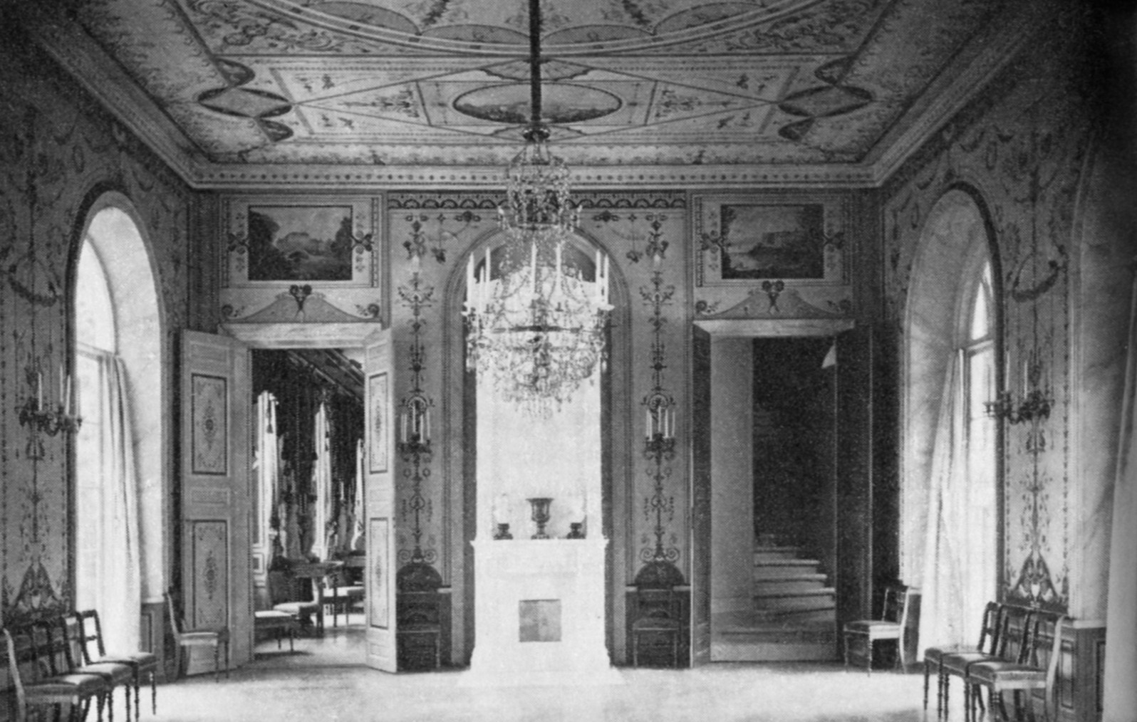 Gustav III:s paviljong, Matsalen under Oskar I:s tid